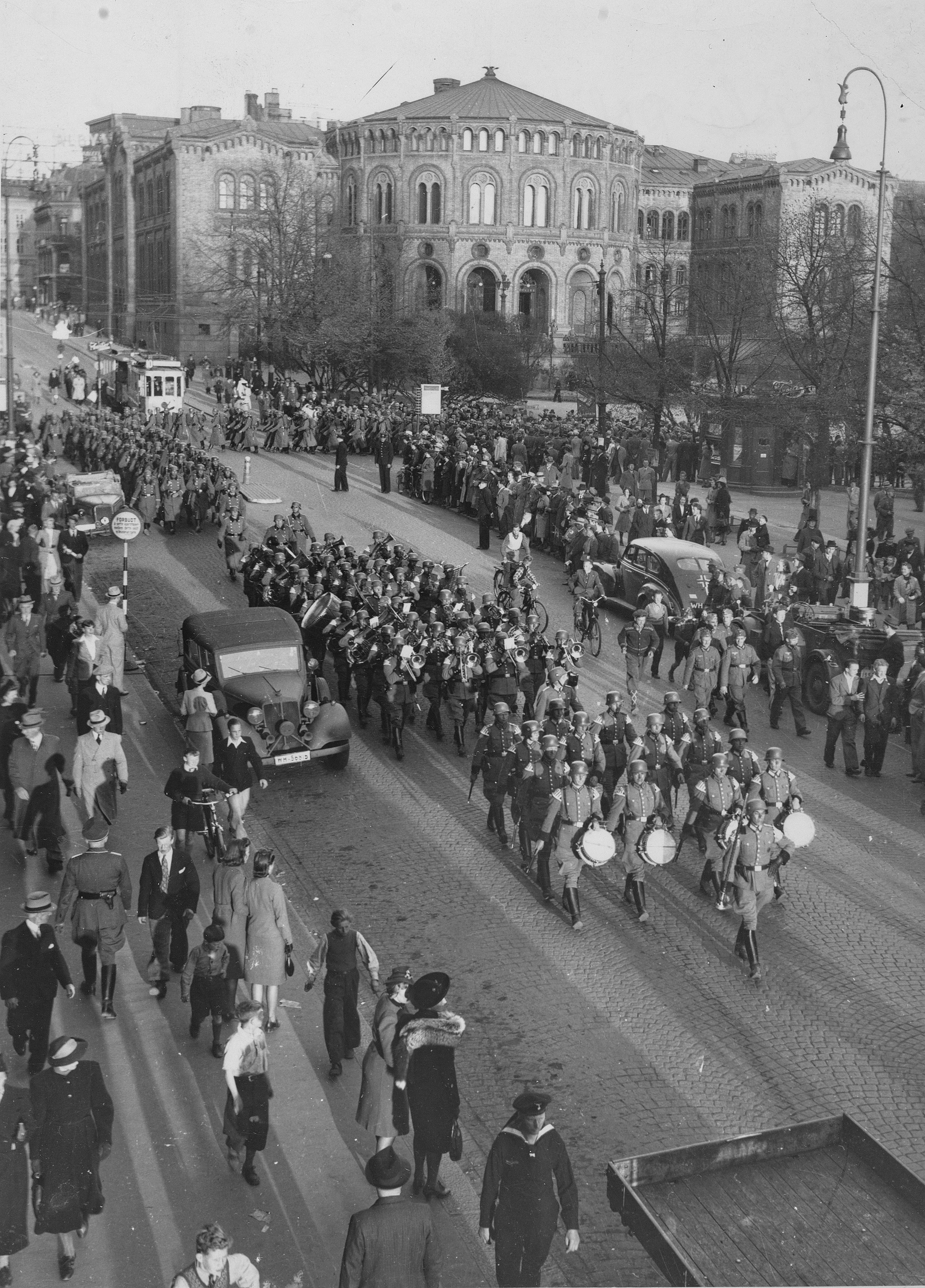 Tyske tropper ankommer Oslo i mai 1940.